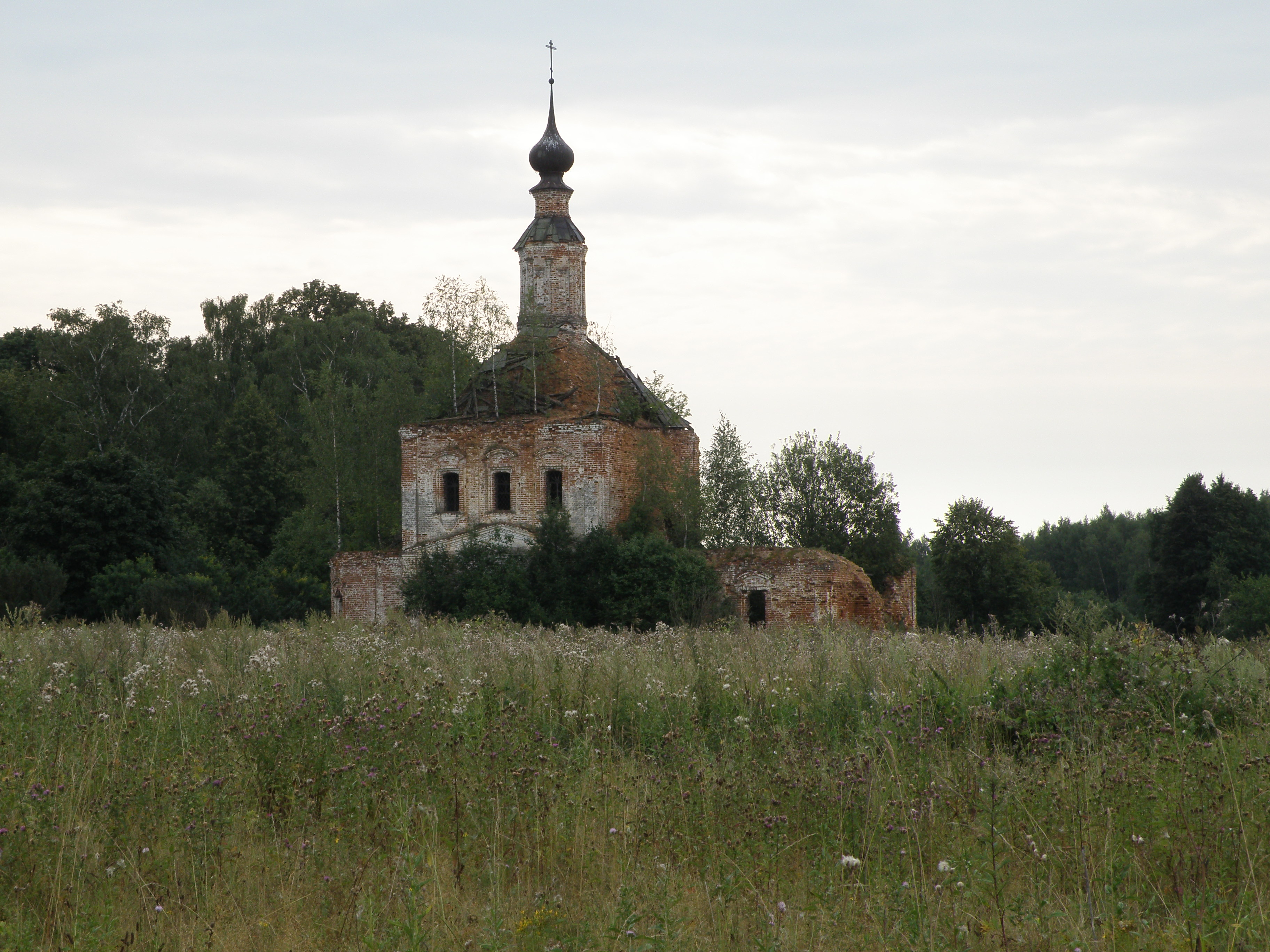 Стробыковская церковь в Суздальском районе